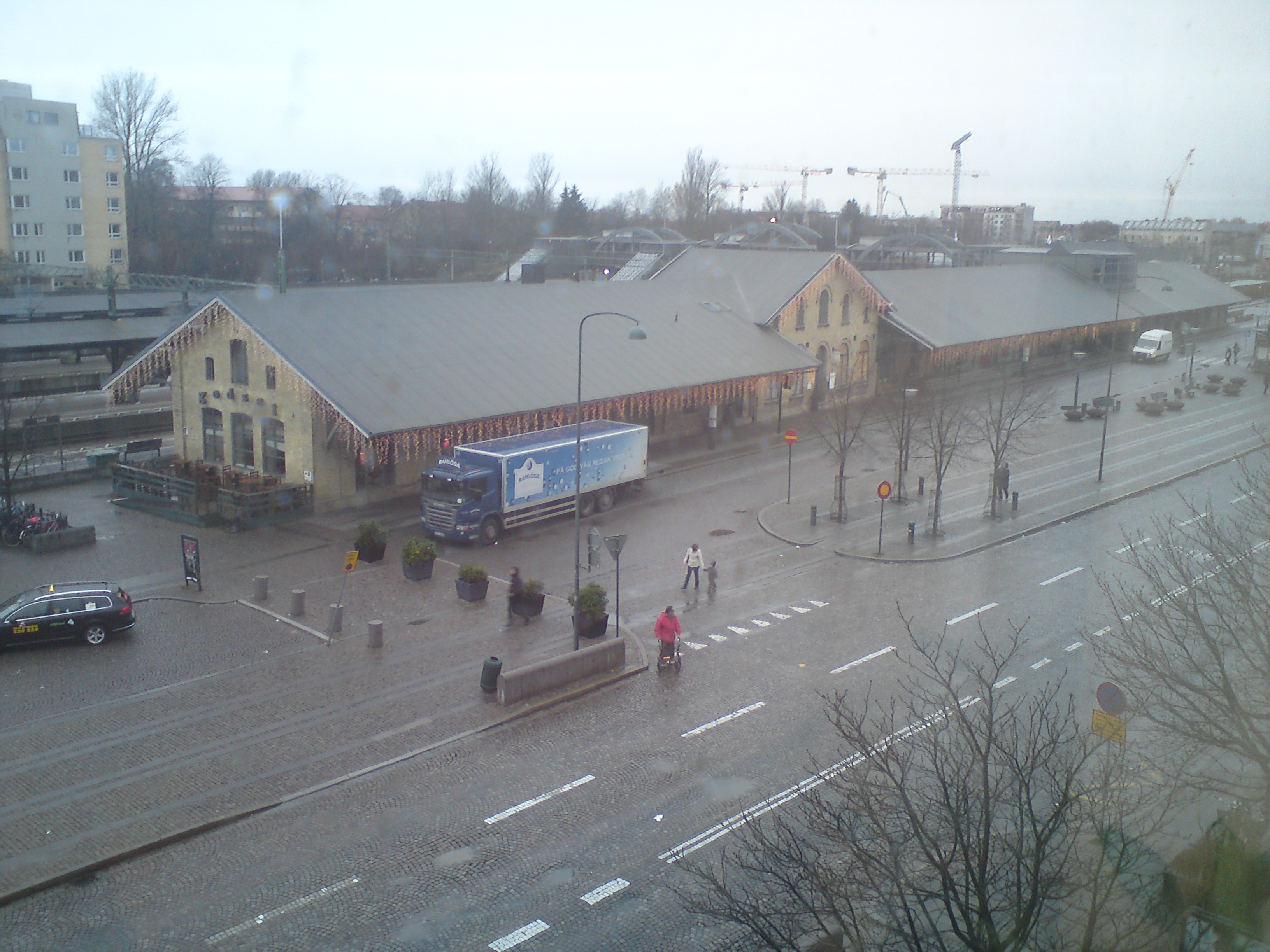 Godsmagasinet vid Lund C vintern 2011-2012 med ljusutsmyckning.